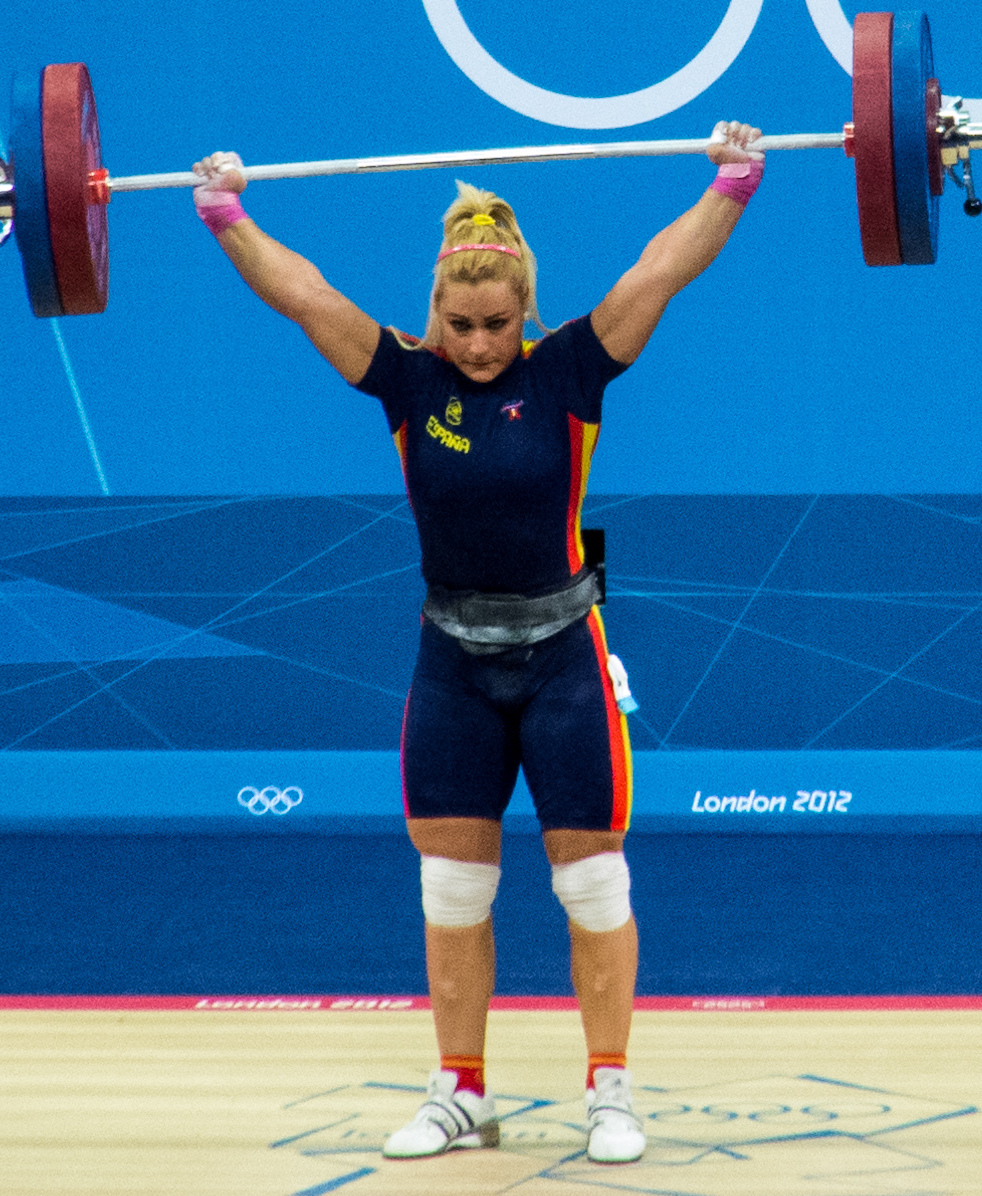 Lidia Valentín, 2012 Olympics